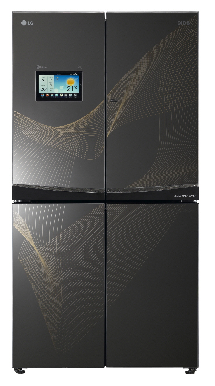 LG전자가 스마트 기능을 획기적으로 향상한 냉장고 신제품 ‘스마트 디오스 V9100’ 을 출시하며 국내 스마트가전 시장 주도권을 한층 강화한다.